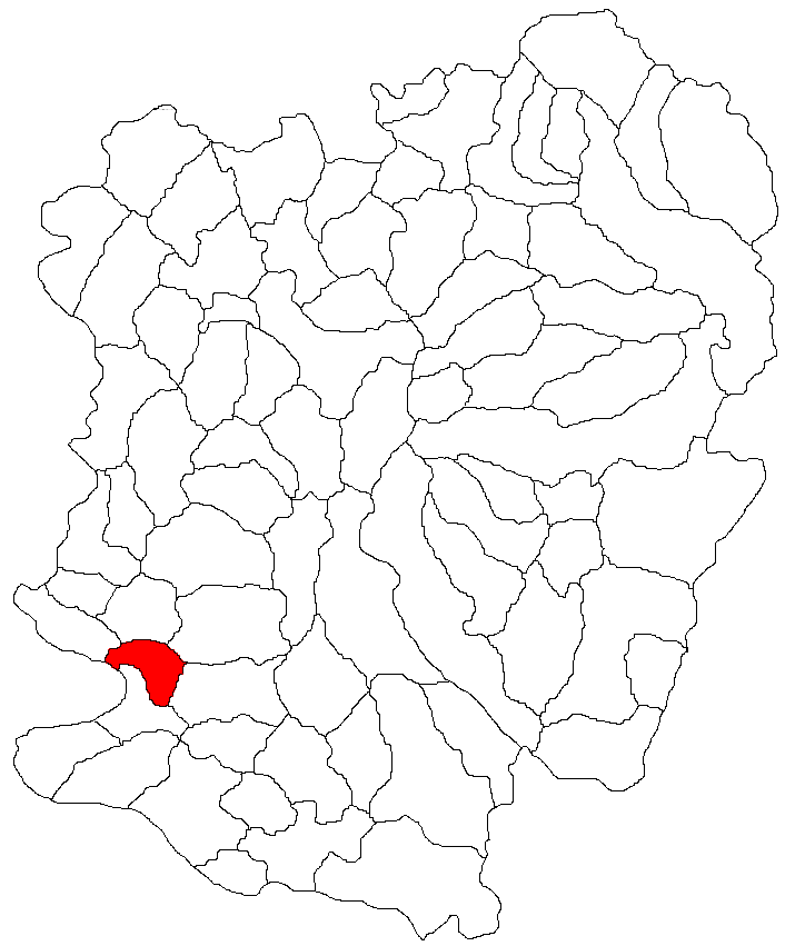 Categorie:Hărţi ale judeţului Caraş-Severin